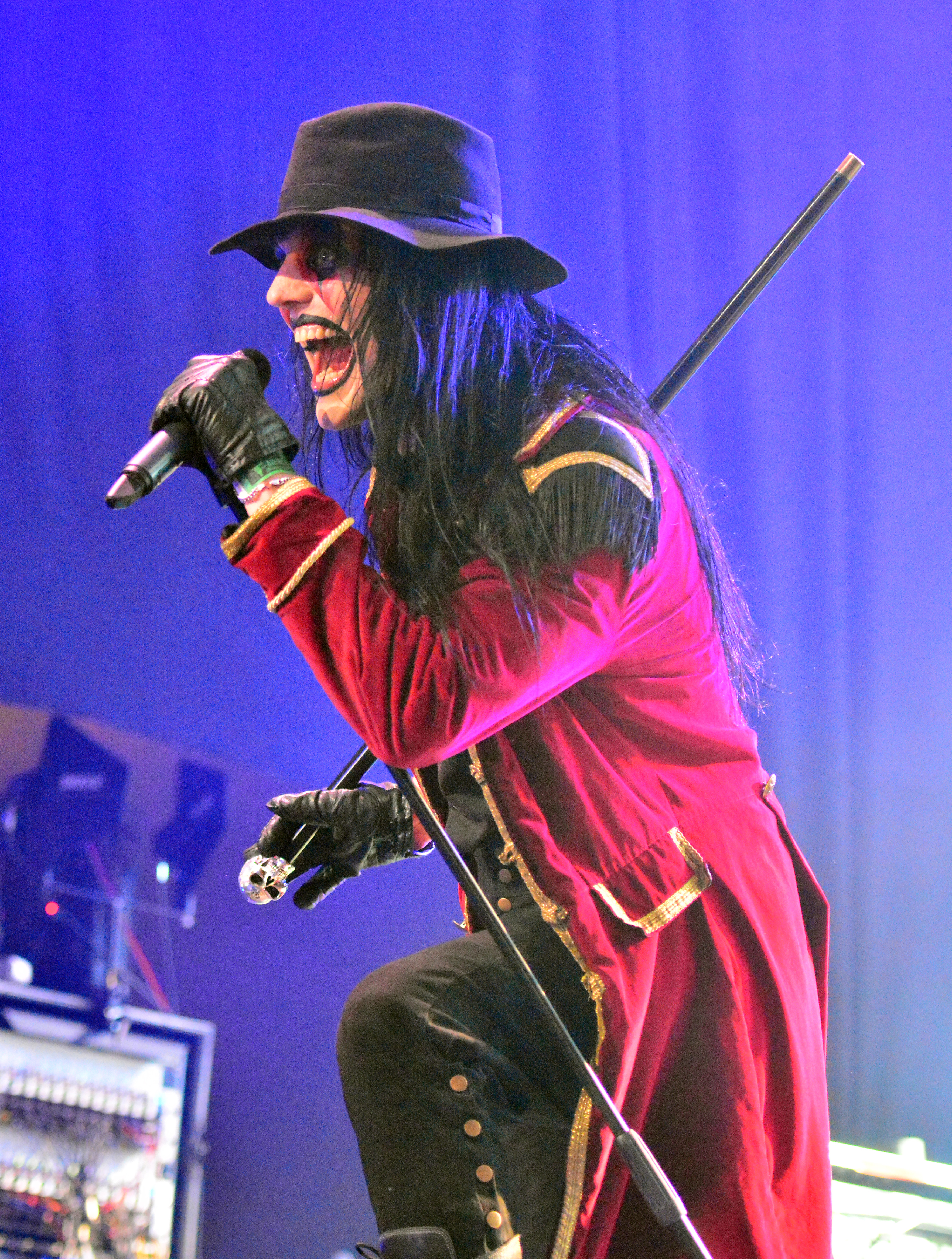 Avatar beim Wacken Open Air 2015